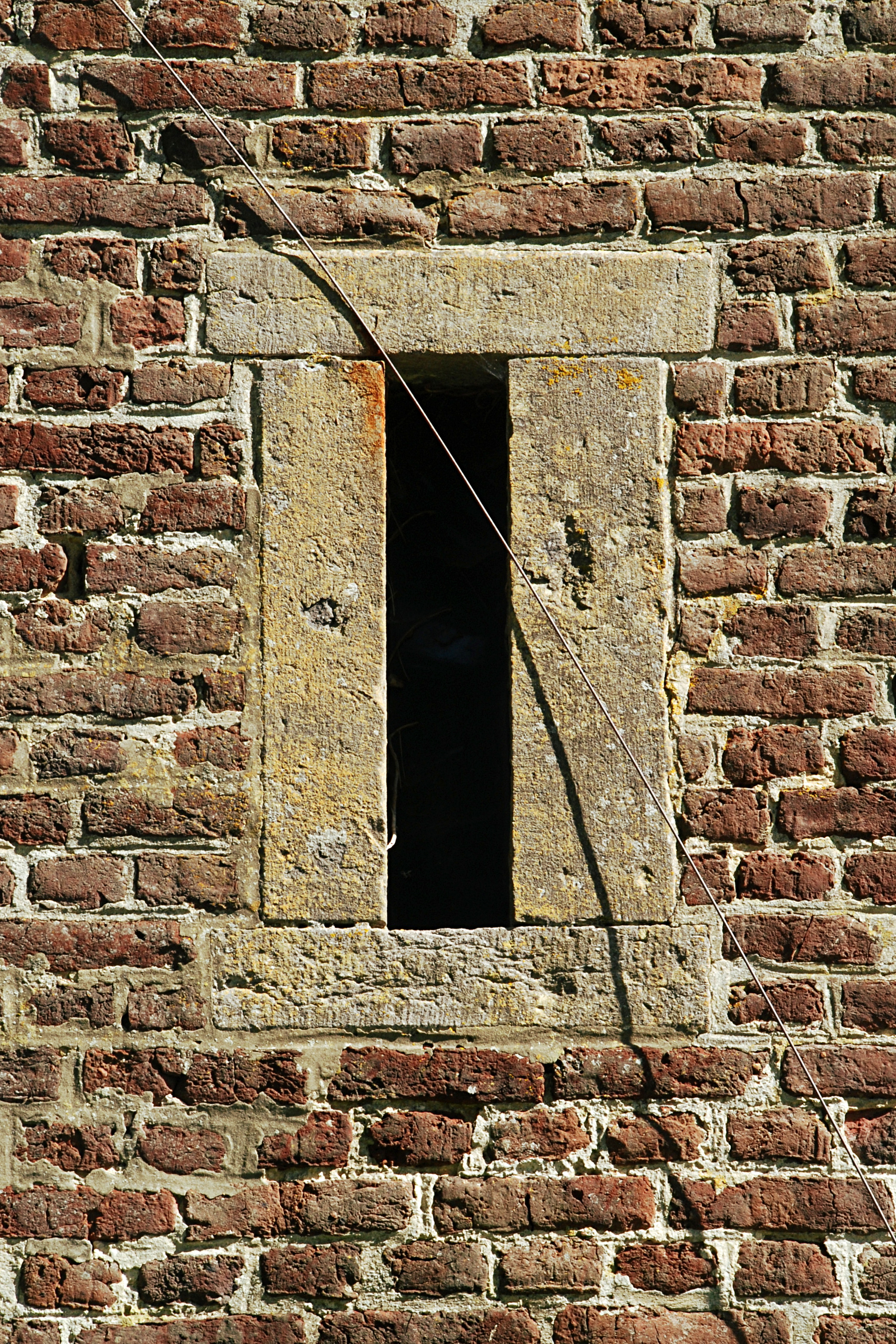 Belgique - Brabant wallon - Genappe - Glabais - Église Saint-Pierre